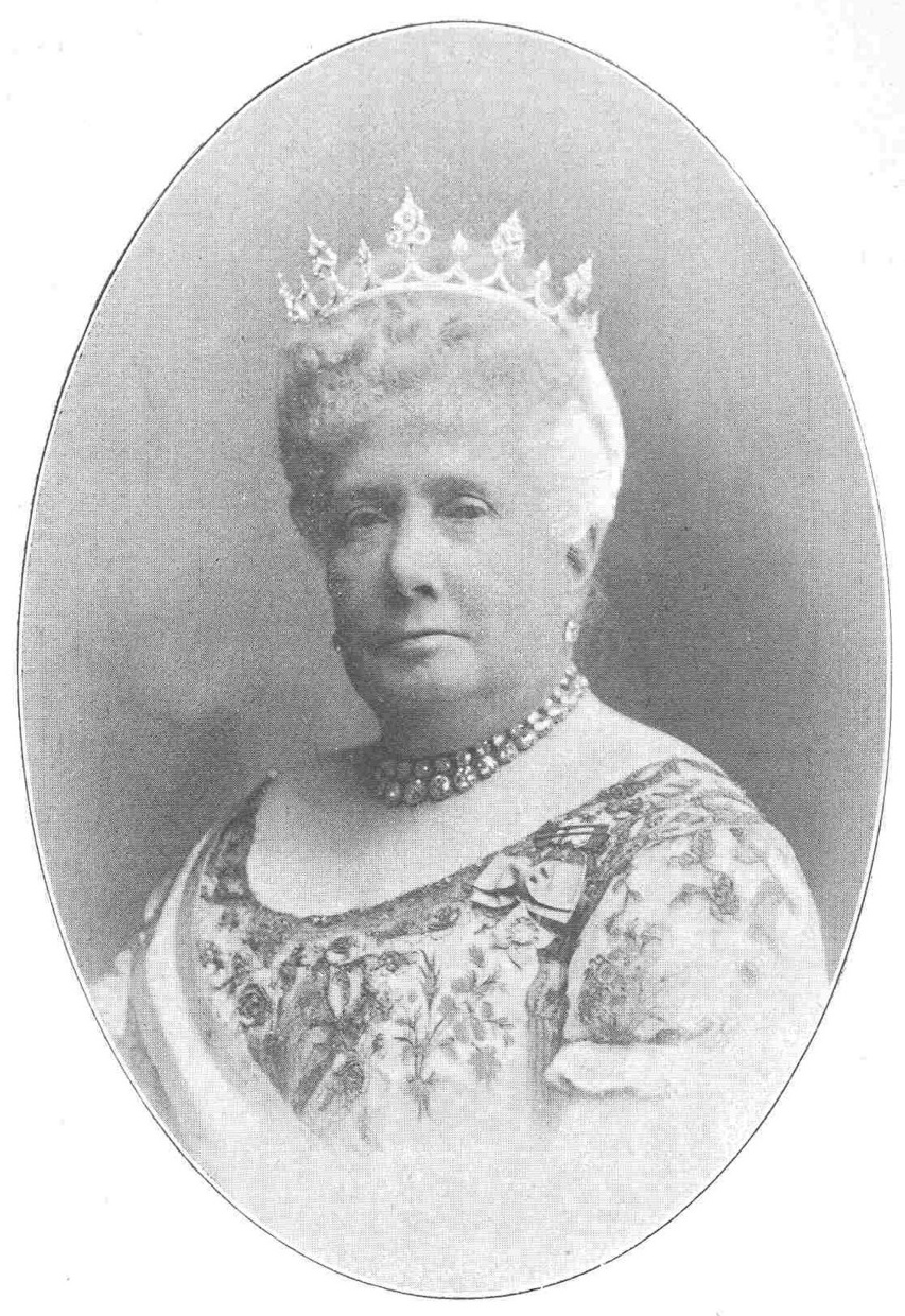 Isabel de Borbón, por Kaulak.